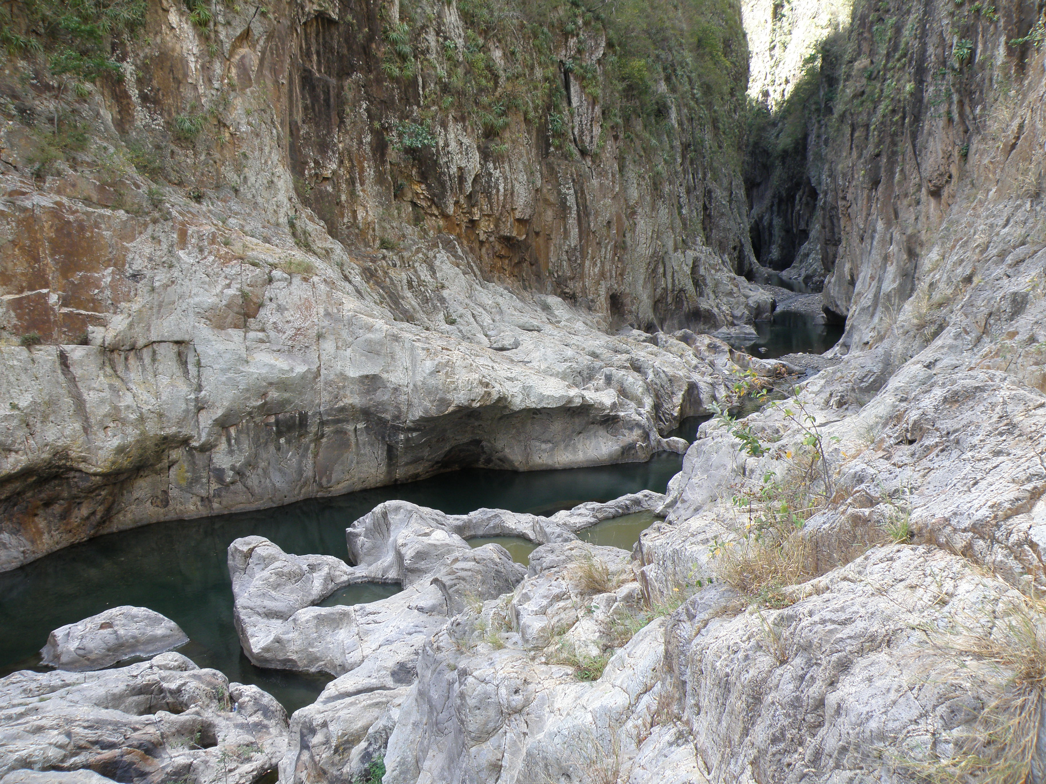 Le site du Canyon de Somoto se trouve à 2 km à l'Ouest de la ville de Somoto dans le département de Madriz au Nicaragua